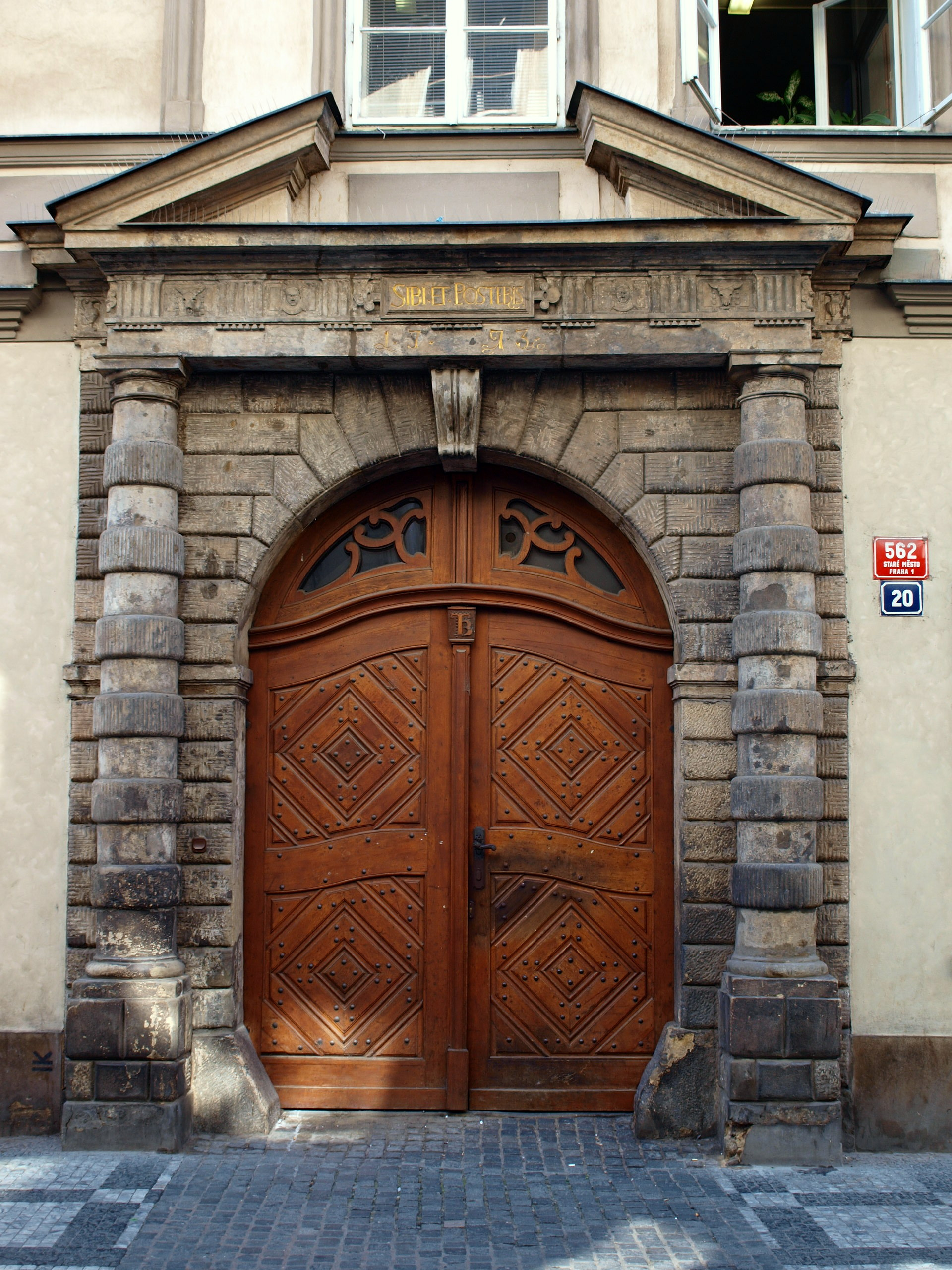 Buquoyský palác (Celetná)